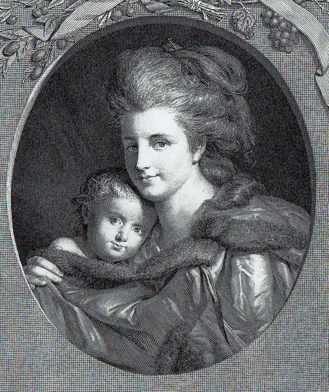 La Tendre Mère, Kupferstich u. Radierung, IV. Zustand, Graph. Sammlung am Kunsthist. Inst. Tübingen